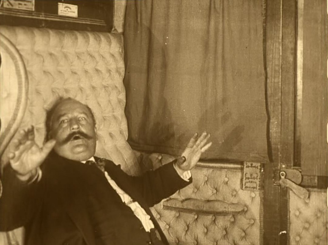 Laurent Morléas dans "Juve contre Fantômas" (Feuillade, 1913)